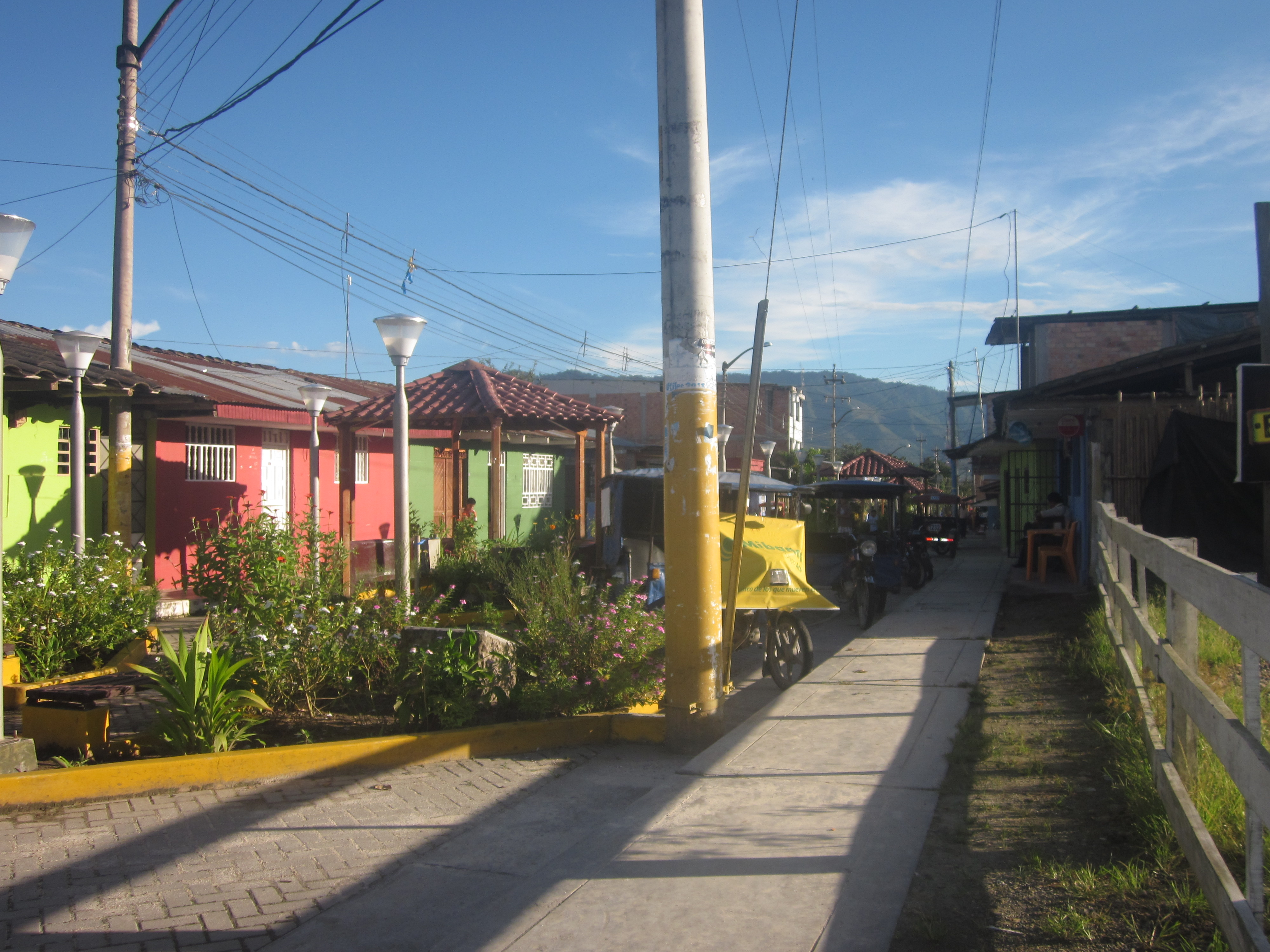 Entrada a la zona "Antro" en Moyobamba